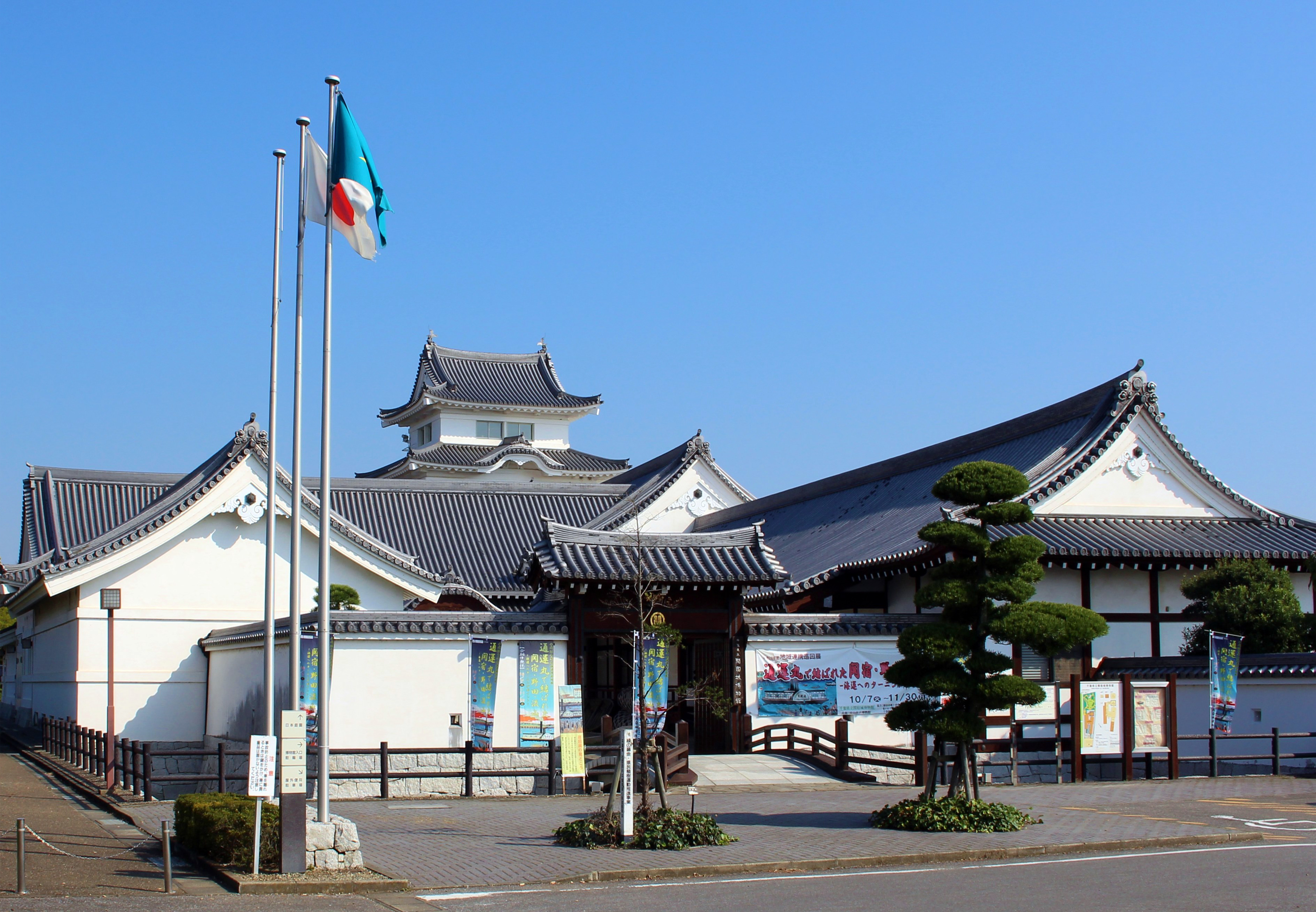 関宿城